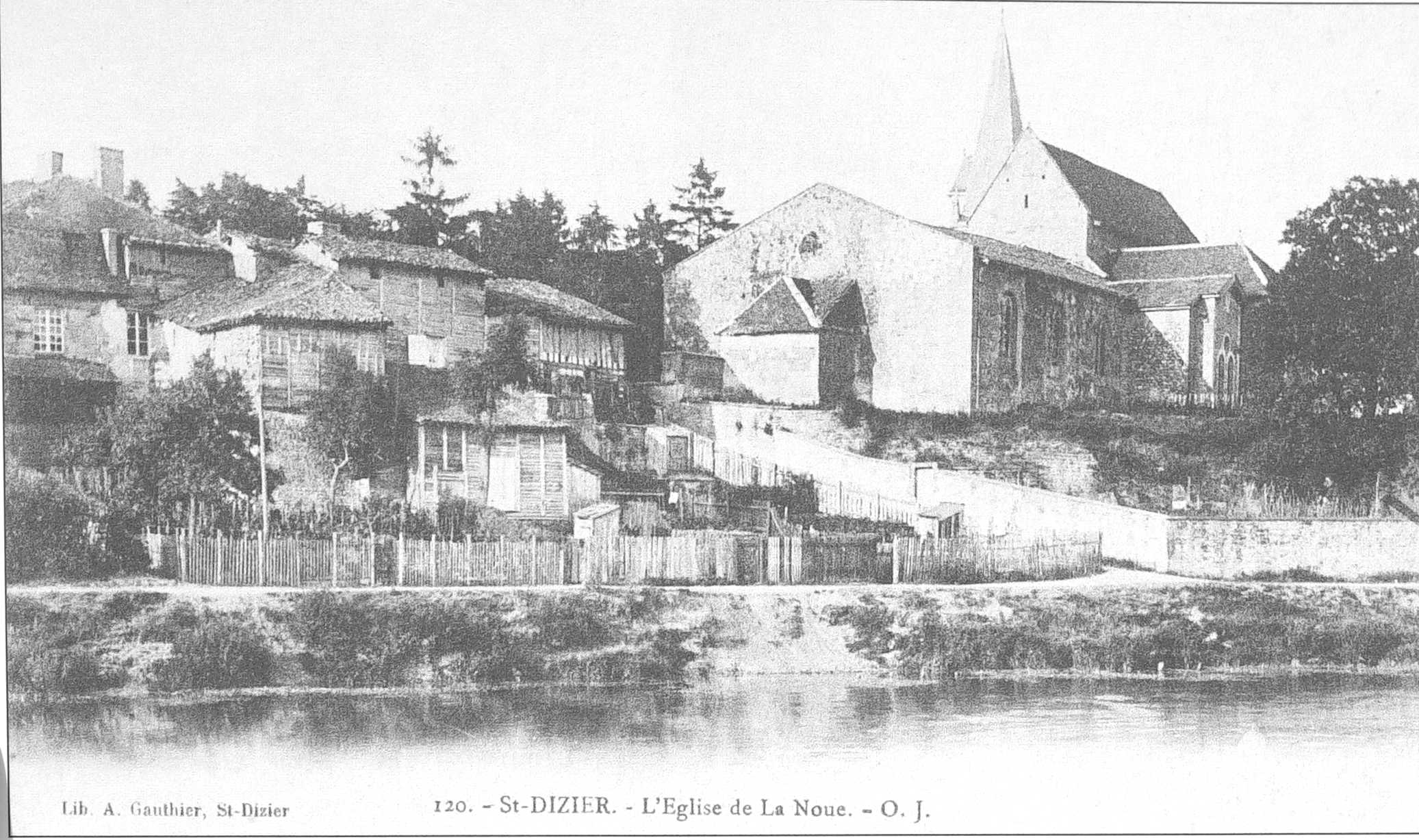 carte postale de Église Saint-Martin de la Noue.